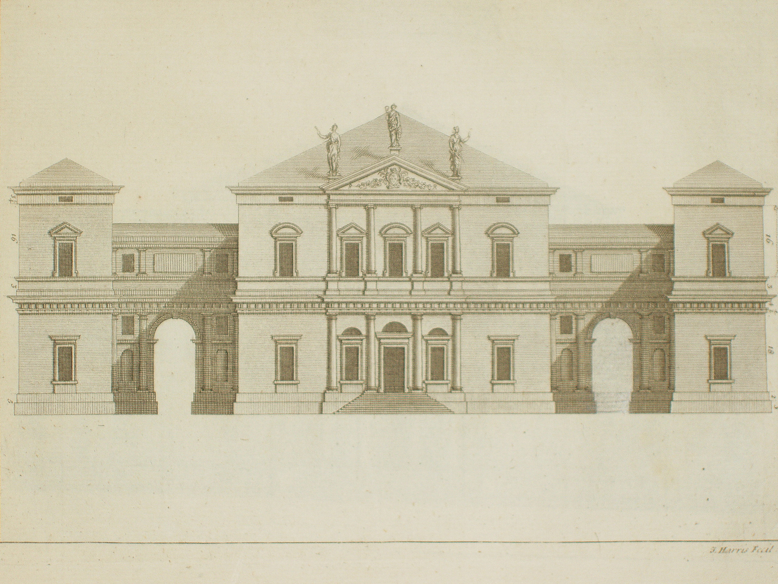 Villa Pisani in Leoni from Palladio